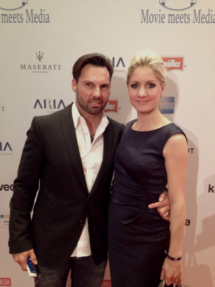 TJ mit Ehefrau Sandra, Berlinale 2014